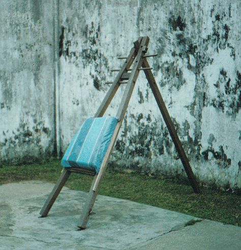 Gestell für Körperstrafen in einem Malaysischen Gefängnis. Aufnahmeort: das seit 1997 für die Öffentlichkeit zugängliche ehemalige Gefängnis "Pudu Prison" in Kuala Lumpur, Malaysia, in dem neben Hinrichtungen auch Körperstrafen (als Strafe für bestimmte Übertretungen der Gefängnisregeln) durchgeführt wurden. Der Delinquent ist dabei nackt bis auf eine Art kurze Hose, die die Nieren- und Genitalregion schützt, aber das Gesäß unbedeckt lässt, und wird stehend mit Handgelenken, Beinen und der Taille an das abgebildete Gestell gebunden. Die Züchtigung erfolgt mit einem Rohrstock aus Rattan auf das Gesäß (nicht auf den Rücken). Dabei anwesend sind neben dem "Zuchtmeister" und weiteren Gefängnisaufsehern auch ein Arzt, der die Züchtigung gegebenenfalls abbrechen kann. Im Pudu-Prison-Museum wird ein Videofilm gezeigt, der bei einer echten solchen Züchtigung mitgeschnitten wurde. Er soll (auch für die zusehenden Kinder) als Abschreckung wirken. In Malaysia gibt es die Züchtigungsstrafe im Gesetz nur für Männer und männliche Jugendliche (bei Minderjährigen mit einem etwas dünneren Rohrstock und weniger Schläge). Der Ausdruck "TEMPAT SEBAT ROTAN" steht auf einem Schild, das heute Museumsbesuchern den Weg zum Züchtigungsraum weist. Die englische Übersetzung lautet "caning area" (deutsch: Züchtigungsbereich).